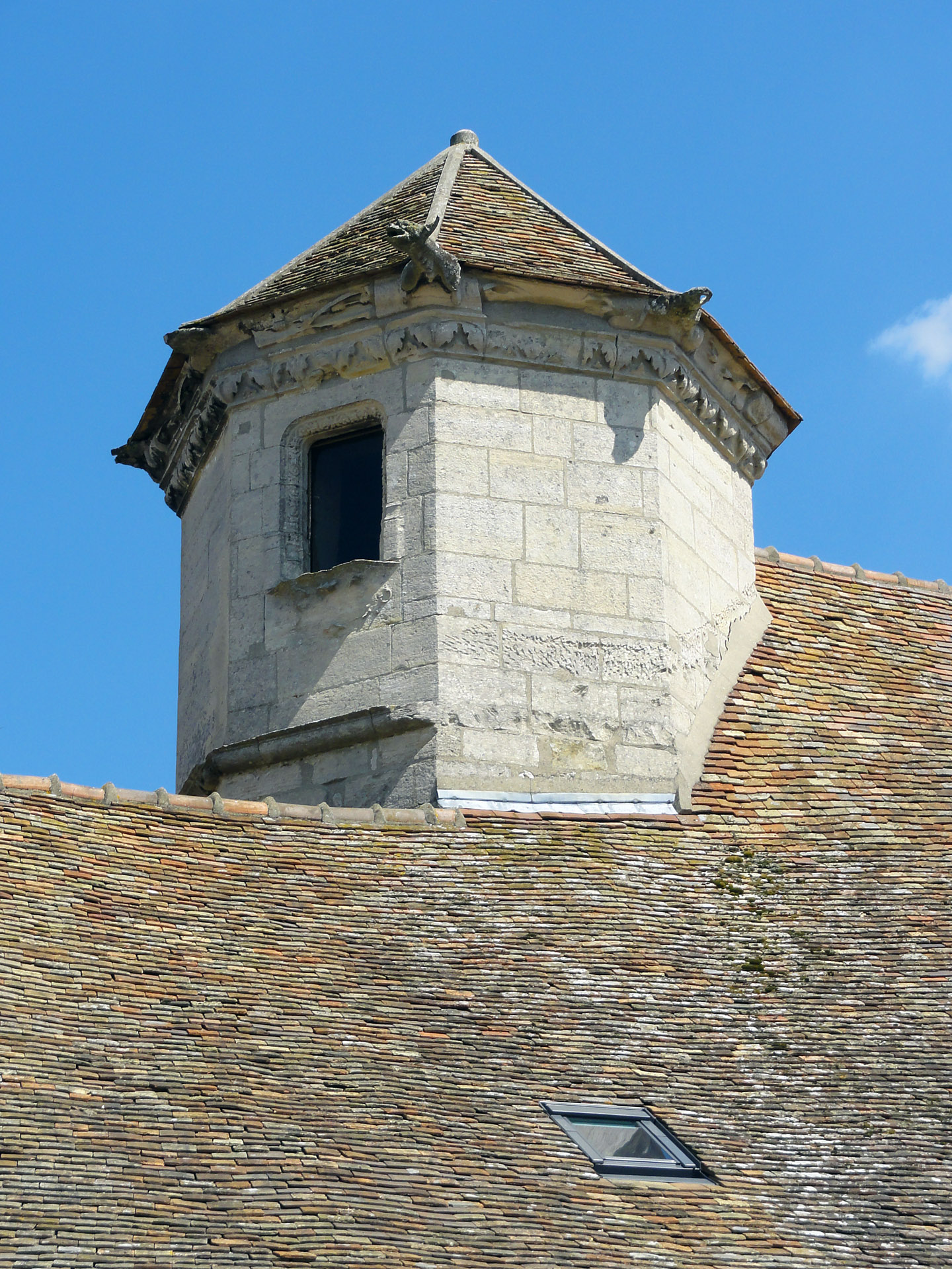 Colombier hexagonal de la ferme de l'Hôtel-Dieu, Le Bellay-en-Vexin, France.